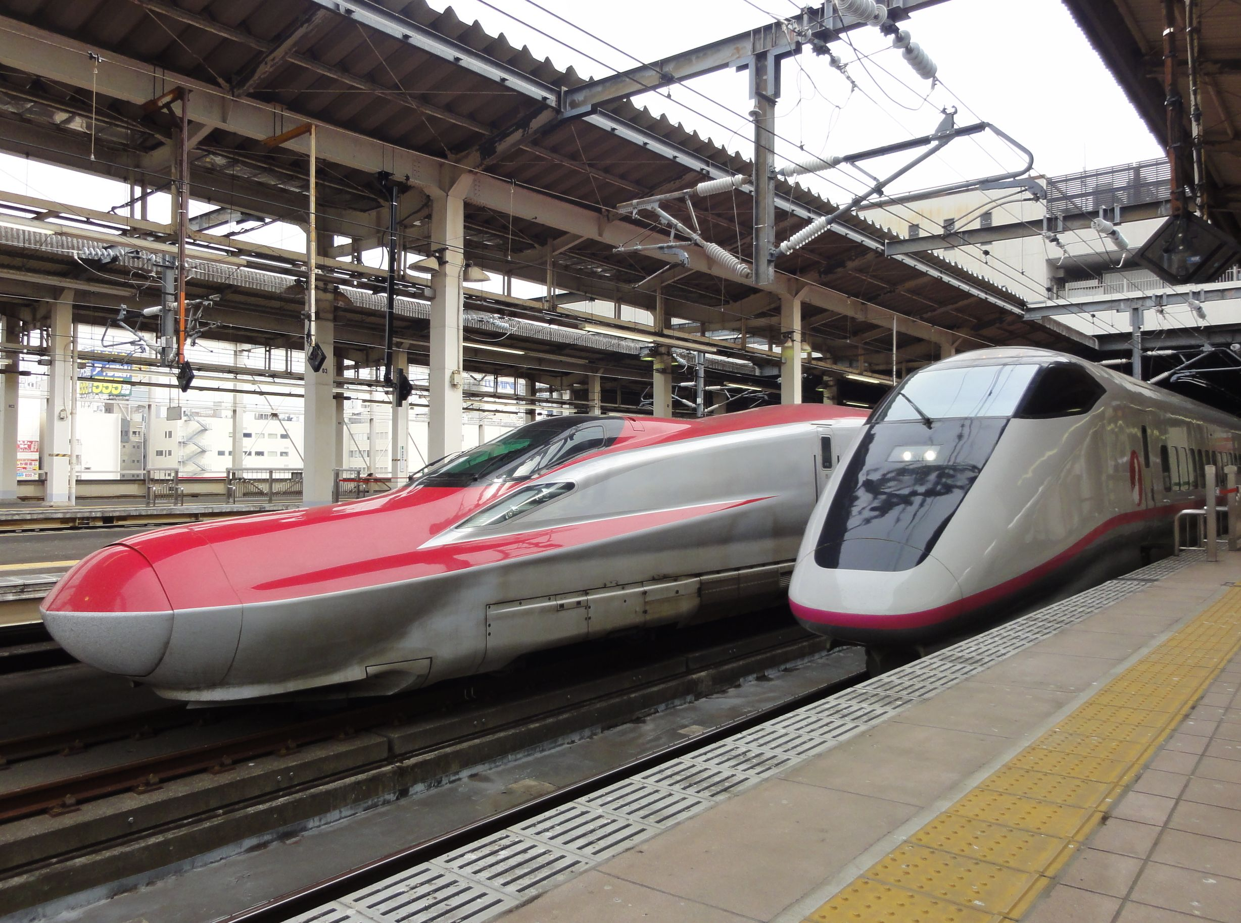 新幹線E6系（秋田新幹線用）・E3系（秋田新幹線用）